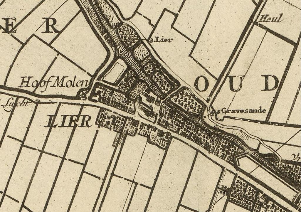 Kaart van het hoogheemraadschap van Delfland, gemeten door de landmeters Nicolaas en Joacobus Kruchius. Afgebeeld is De Lier, Zuid-Holland.